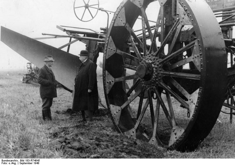 Deutscher Riesenpflug vorgestellt Illus-dpd Ein deutscher Riesenpflug Unser Bild zeigt den grossen von Wilhelm Ottomeyer aus Alexisdorf im Emsland konstruierten Kuhlpflug, der den Erdboden bis zu einer Tiefe von 1,20 m umpflügt. 7-9-48 2081-48